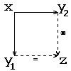 Definição de confluência forte. Linhas sólidas representam o quantificador universal e linhas tracejadas representam o quantificador existencial.